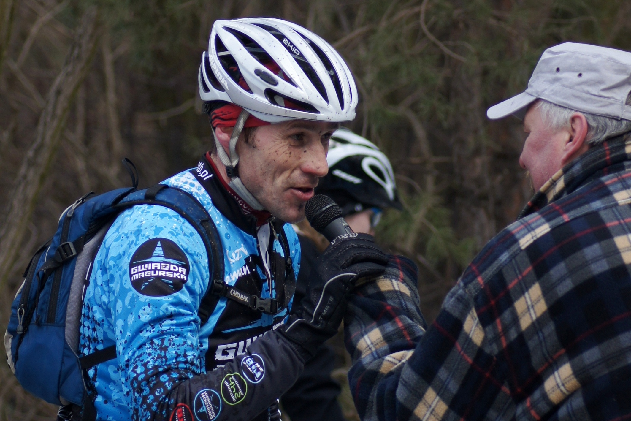 Cezary Zamana po starcie w zimowym MTB Marathon w Józefowie - marzec 2011